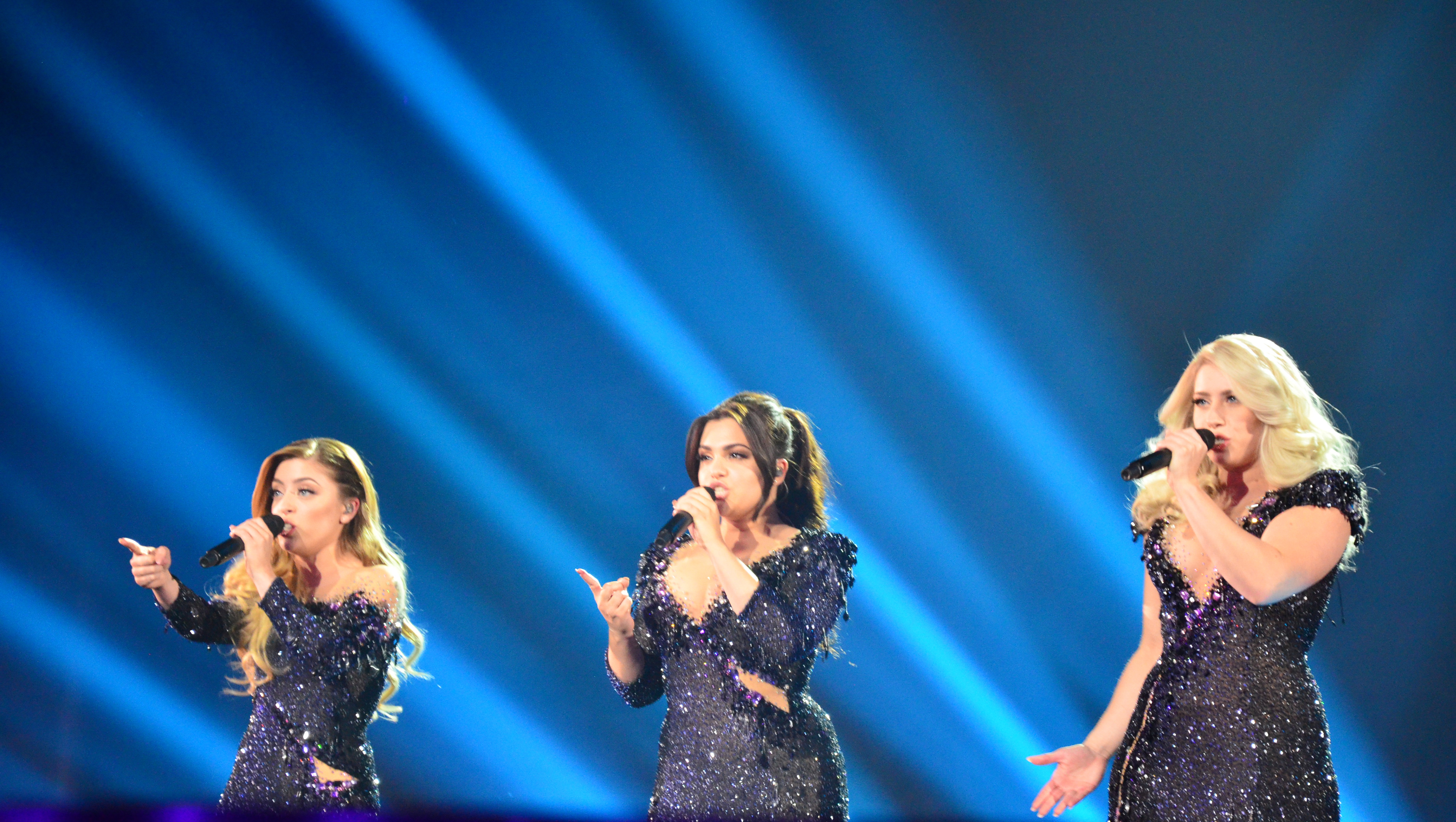 10 травня 2017 року у Києві відбулась генеральна репетиція 2 півфіналу "Євробачення".